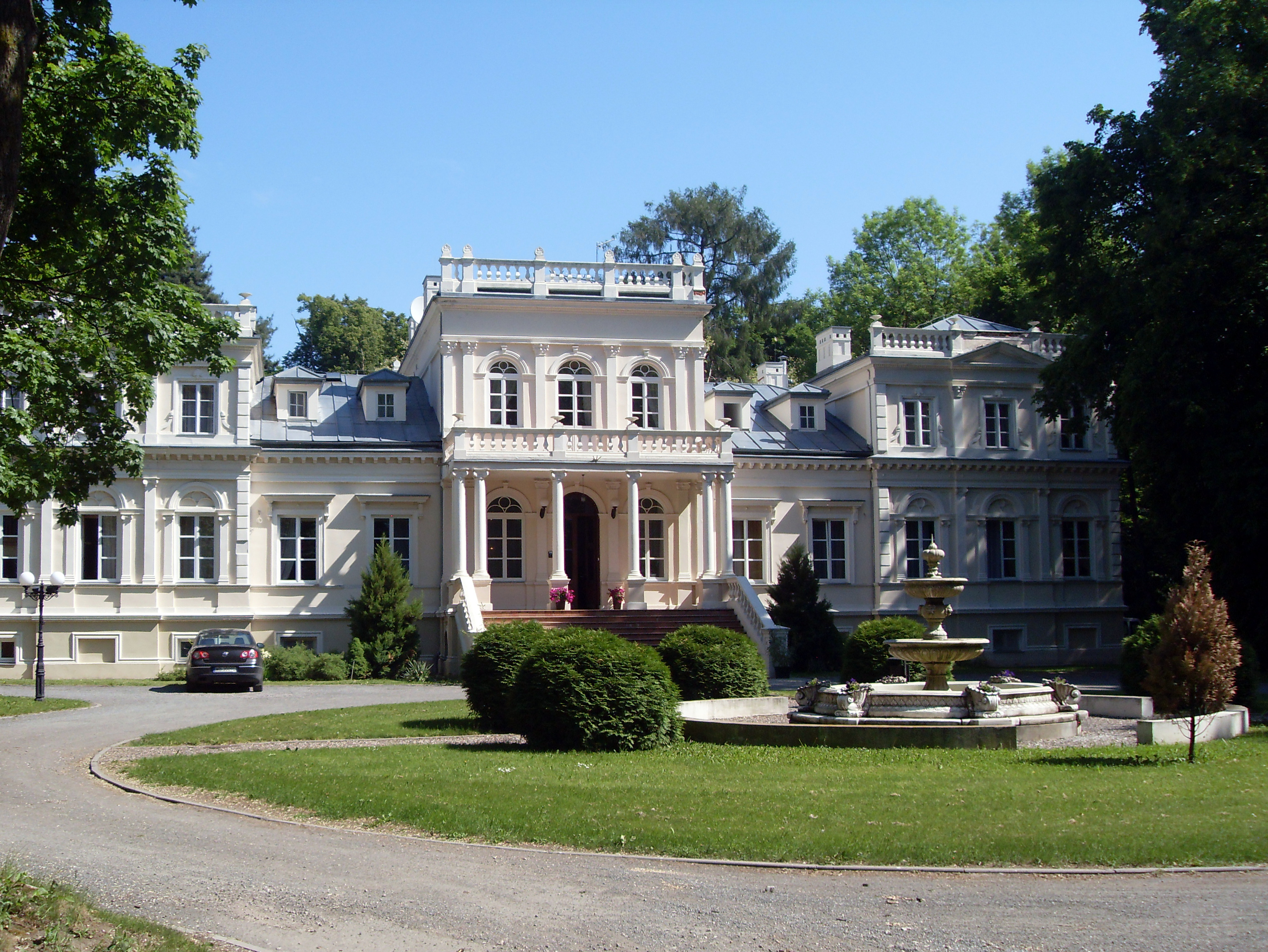 Pałac w Woli Chojnacie